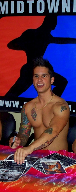 Pierre Fitch em uma sessão de autógrafos em 2010.